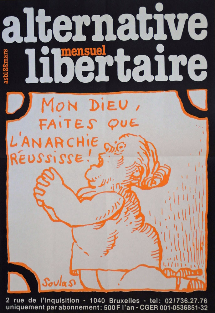 Mon dieu, faites que l’anarchie réussisse ! affiche encartée dans Alternative Libertaire (Belgique) n°76 décembre 1985 (dessin de Soulas).